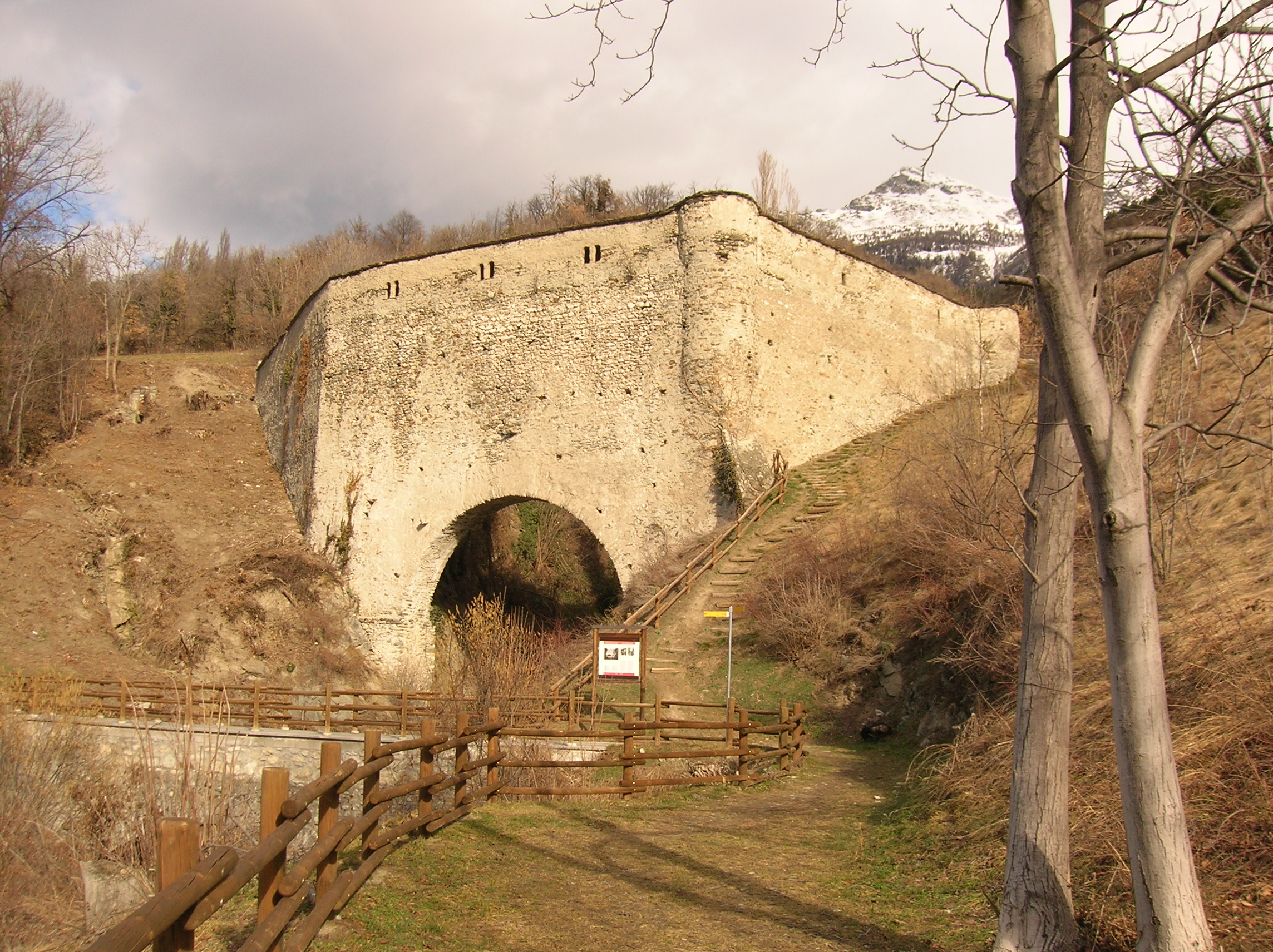 Ponte acquedotto di Grand Arvou, in località Porossan, Aosta, Valle d'Aosta, Italia.